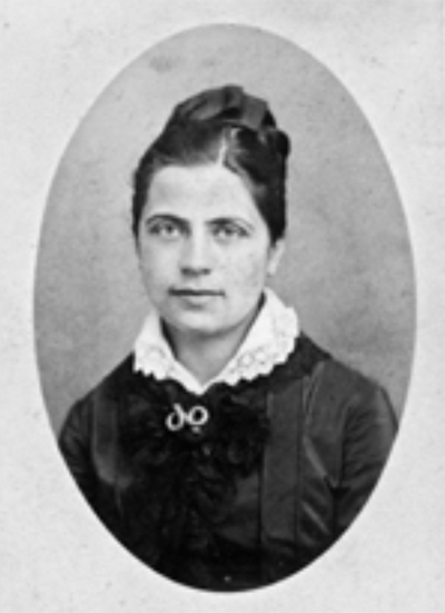 Portraitaufnahme von Rahel Apfel, geb. Bürger, (1857–1912), fotografiert von Tilmann Joseph Dickopf (T.J.Dickopf), Siegburg